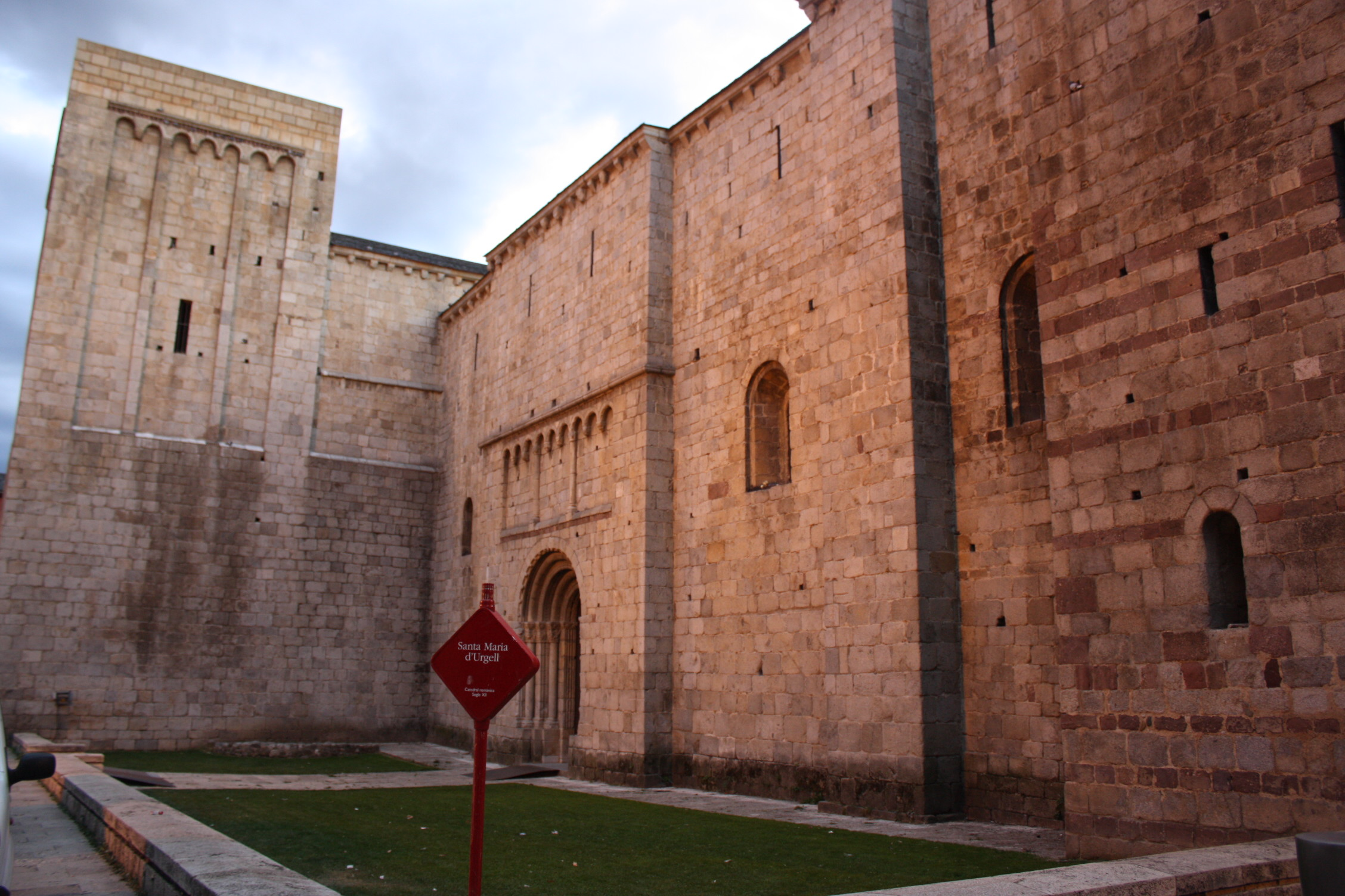 Portal nord i torre de Sant Salvador de la Catedral d'Urgell